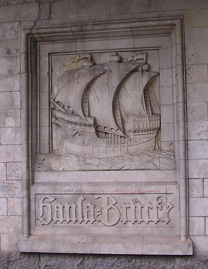 Hansabrücke über die Spree in Berlin. Relief einer Hansekogge im nordöstlichen Sockel. Ehemals zu einem Brückenhäuschen auf der Vorgängerbrücke gehörend.